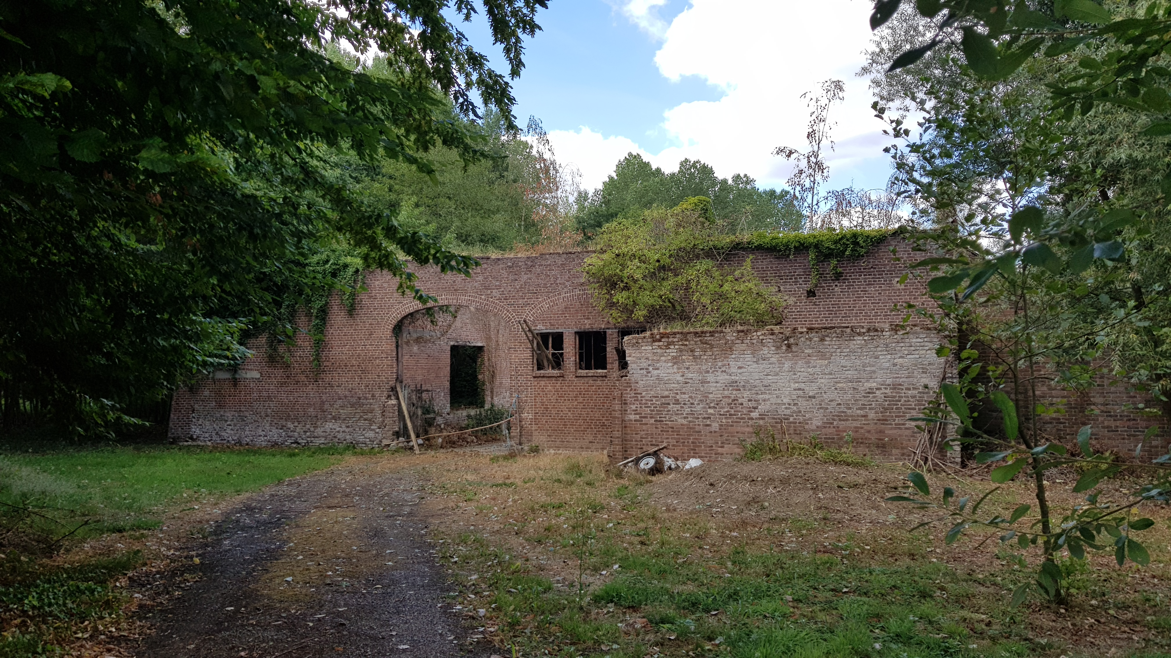 Wintershovenmolen, Wintershoven, Kortessem, België This photo of immovable heritage has been taken in the Flemish Region